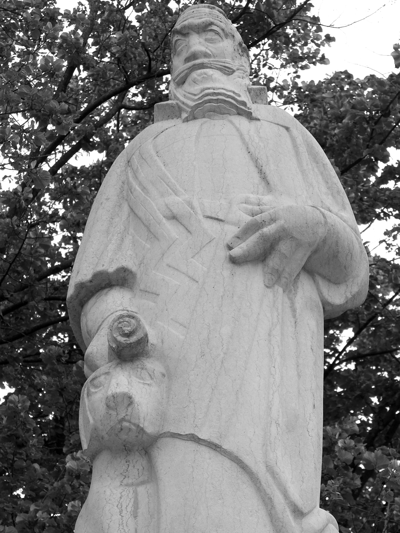 Der Wettsteinbrunnen ging aus dem Kunstkredit Basel-Stadt hervor. Heinz Fiorese, Willi Hege, Peter Moilliet, Jakob Probst, Lous Weber, Adolf Weisskopf und Alexander Zschokke wurden für einen engeren Wettbewerb eingeladen. Die Brunnensäule, an der sich eine rot und blau bemalte Trommel mit Kindern befindet, steht zwischen dem zweistufigen Brunnentrog. Auf der Säule steht der ehemalige Basler Bürgermeister und Staatsmann Johann Rudolf Wettstein (1594 - 1666), der mit seinem Geschick den westfälischen Frieden herbeiführte. Er war ein Jäger und deshalb sitzt sein treuer Hund neben ihm. Am Brunnen steht die Inschrift: "Zum Andenken an Bürgermeister Johann Rudolf Wettstein 1594 - 1666 und zu Erinnerung an die Vereinigung von Kleinbasel und Grossbasel 1392". Der Brunnen hätte eigentlich schon 1892, anlässlich der 500jährigen Vereinigung zwischen Gross- und Kleinbasel entstehen sollen, aber anstatt den benötigten CHF 90000.-- kamen ganze CHF 8172.-- zusammen. So dauerte es bis ins Jahr 1954, bis das nötige Geld mit Zins und Zinseszinsen zusammengekommen war